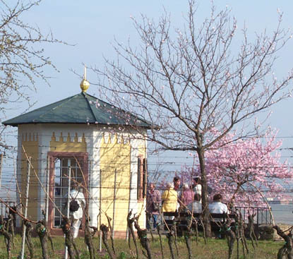 König-Ludwig-Häuschen auf dem Neuberg in Gimmeldingen während der Mandelblüte, selbst fotografiert und freigegeben